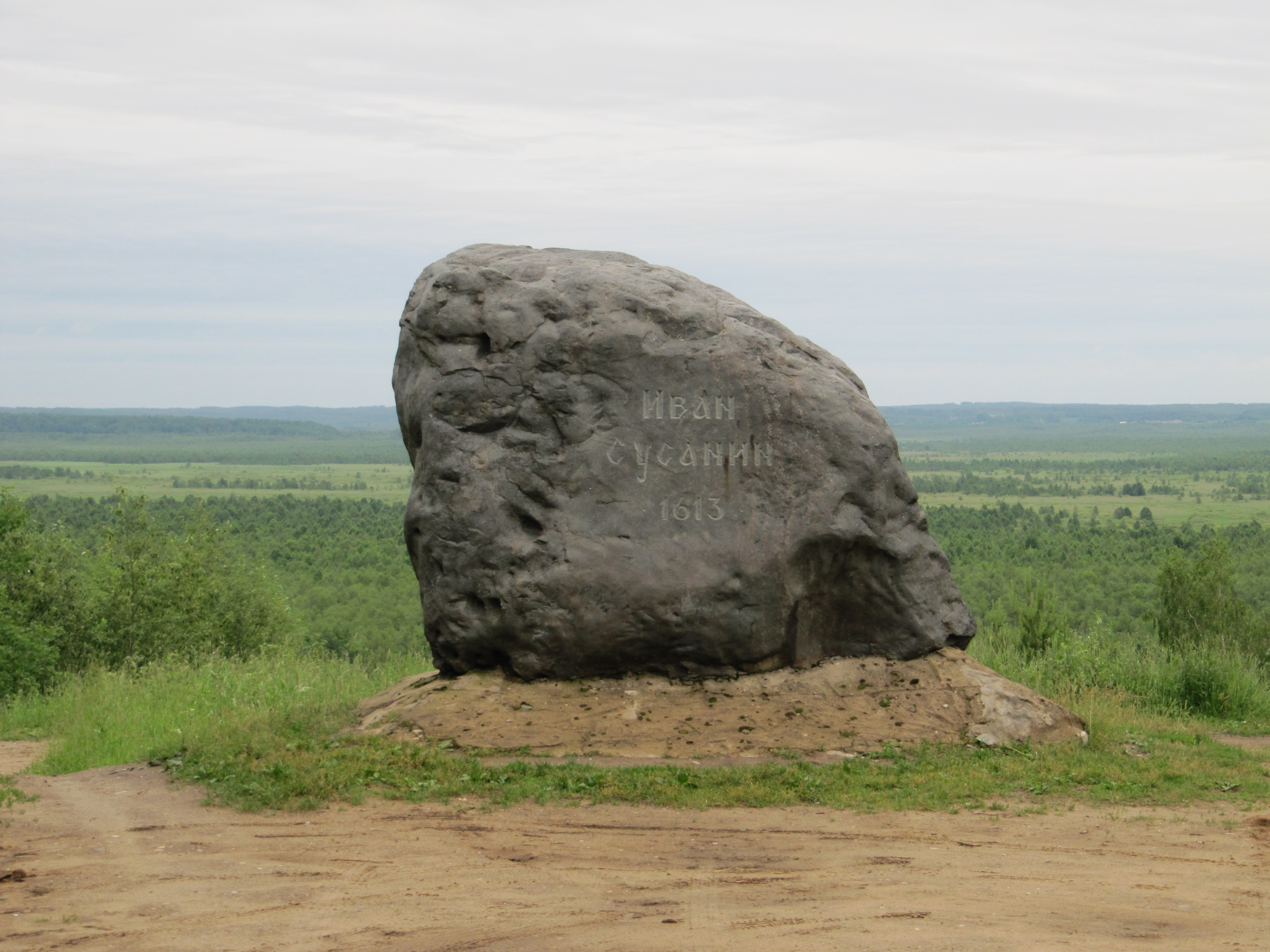 памятный знак Ивану Сусанину над Чистым болотом